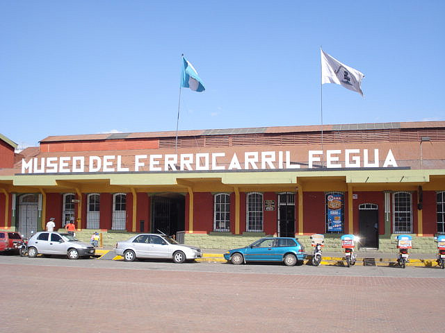 Museo del Ferrocarril FEGUA Camera: Sony DSC-W35 License on Flickr (2011-02-12): CC-BY-2.0 Flickr tags: adels, Guatemala, dumitraqui, FEGUA